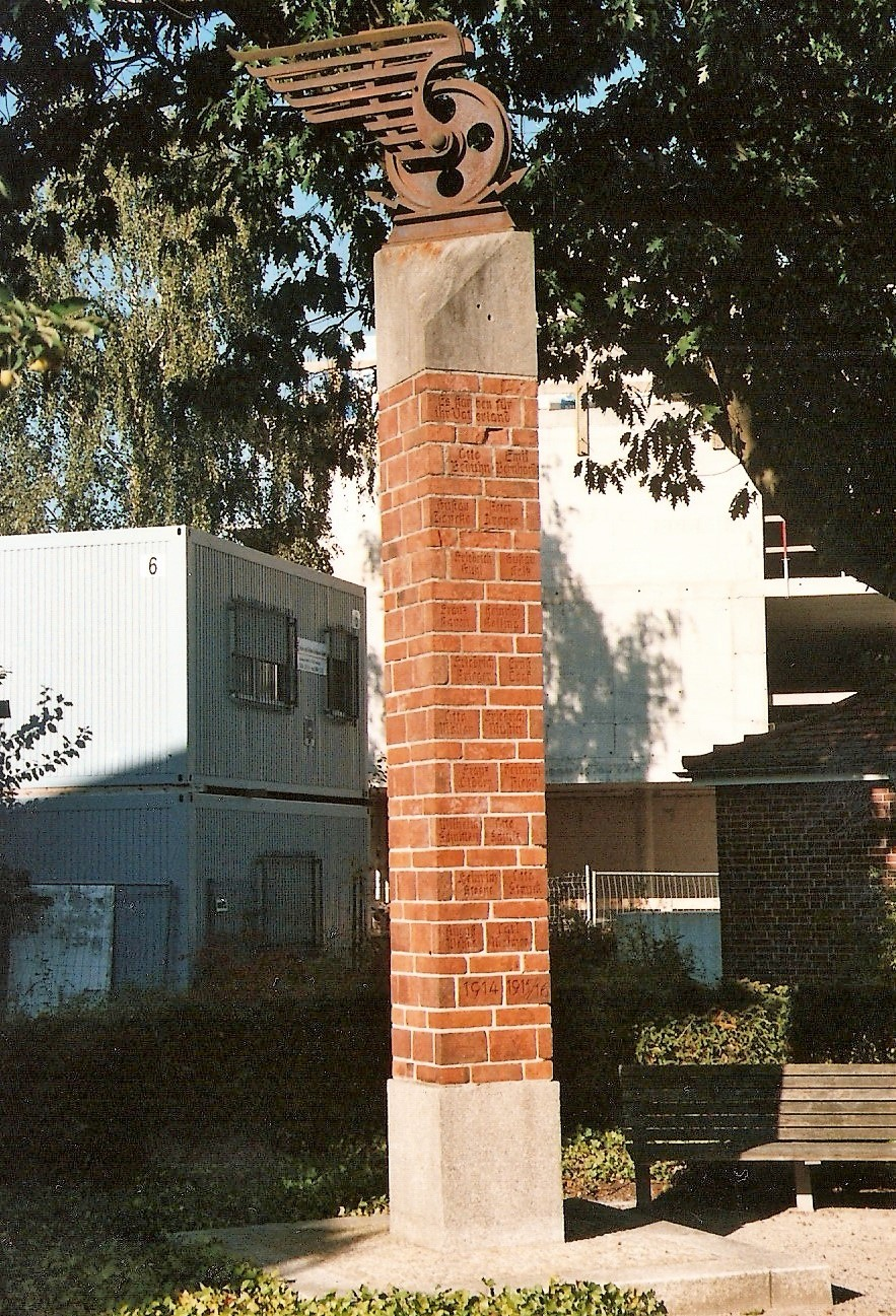 Ehrenmal am Strassenbahndepot